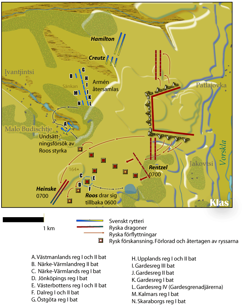 Den svenska armén återsamlas i sänkan. Ryssarna grupperar på flyglarna av sitt befästa läger. Roos ger upp belägringen av den tredje skansen och drar sig tillbaka till skogsbrynet. Ryska trupper följer efter.